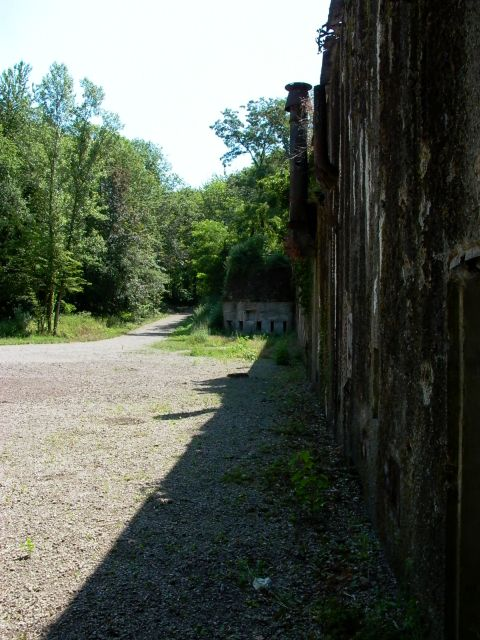 Illange fort (Feste) in Thionville, France.